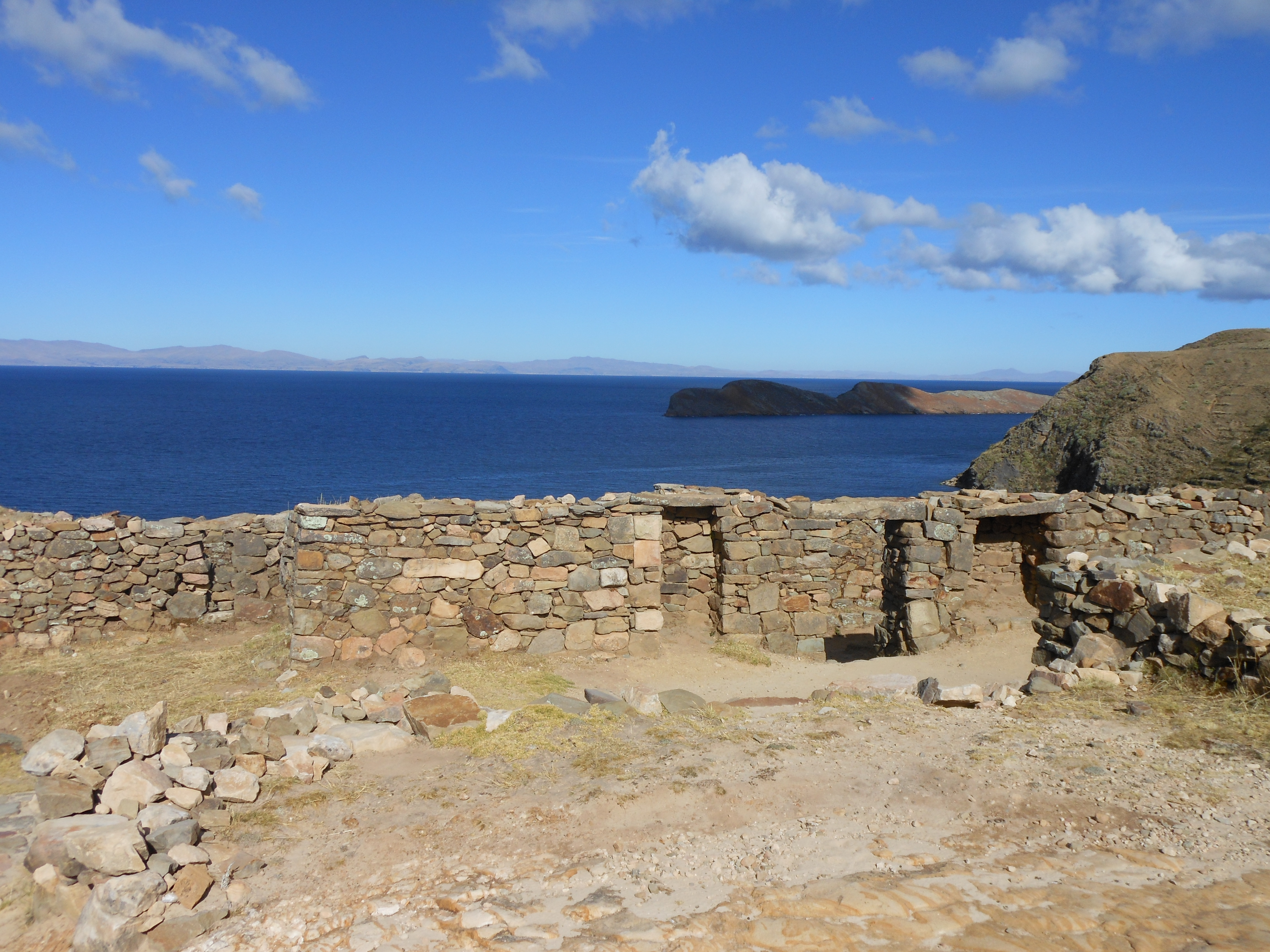 Ruinas Arqueológicas de la Isla del Sol This medium shows the protected monument with the number L/00-294 in Bolivia.